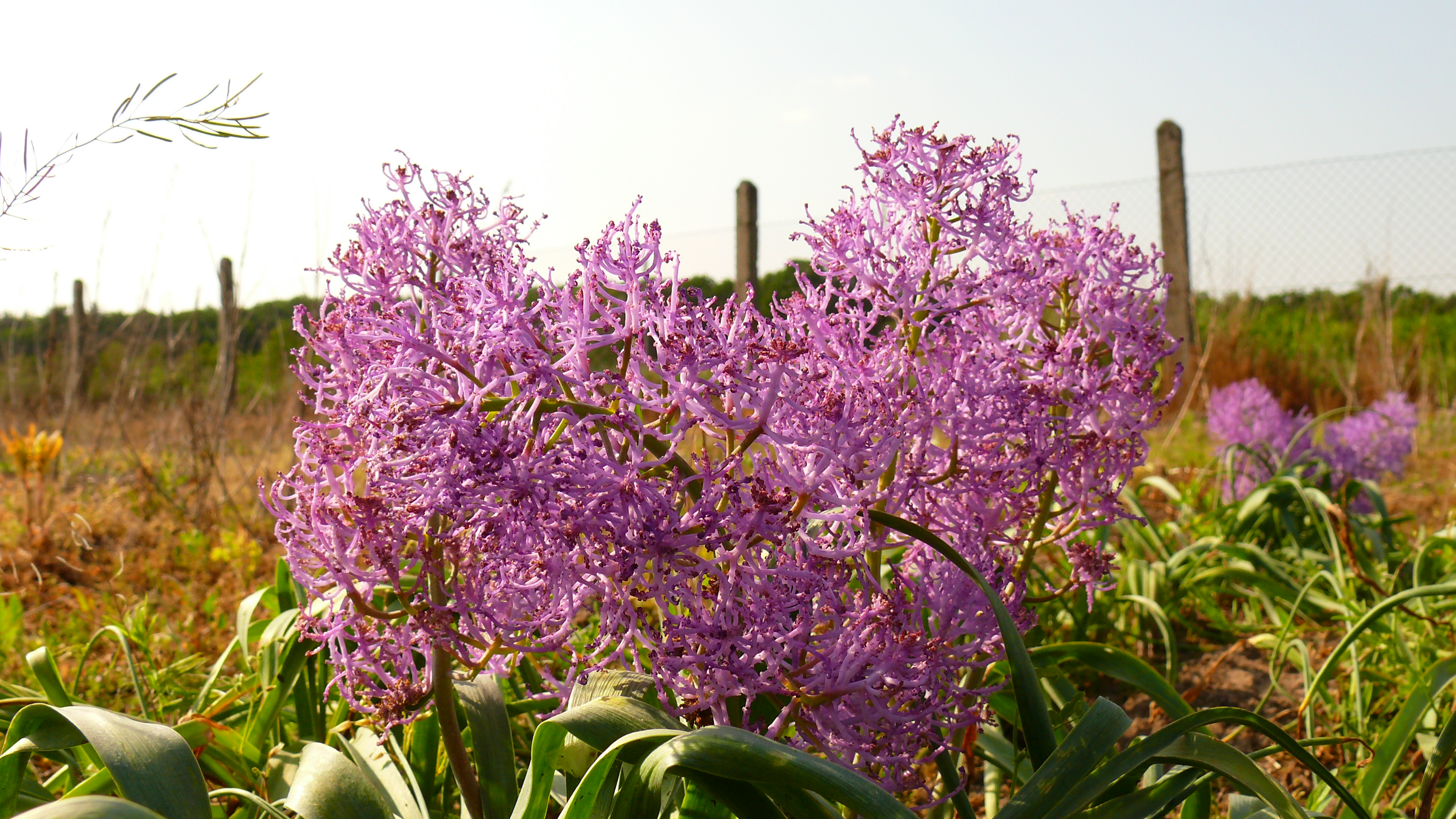 Muscari comosum 'Plumosum'